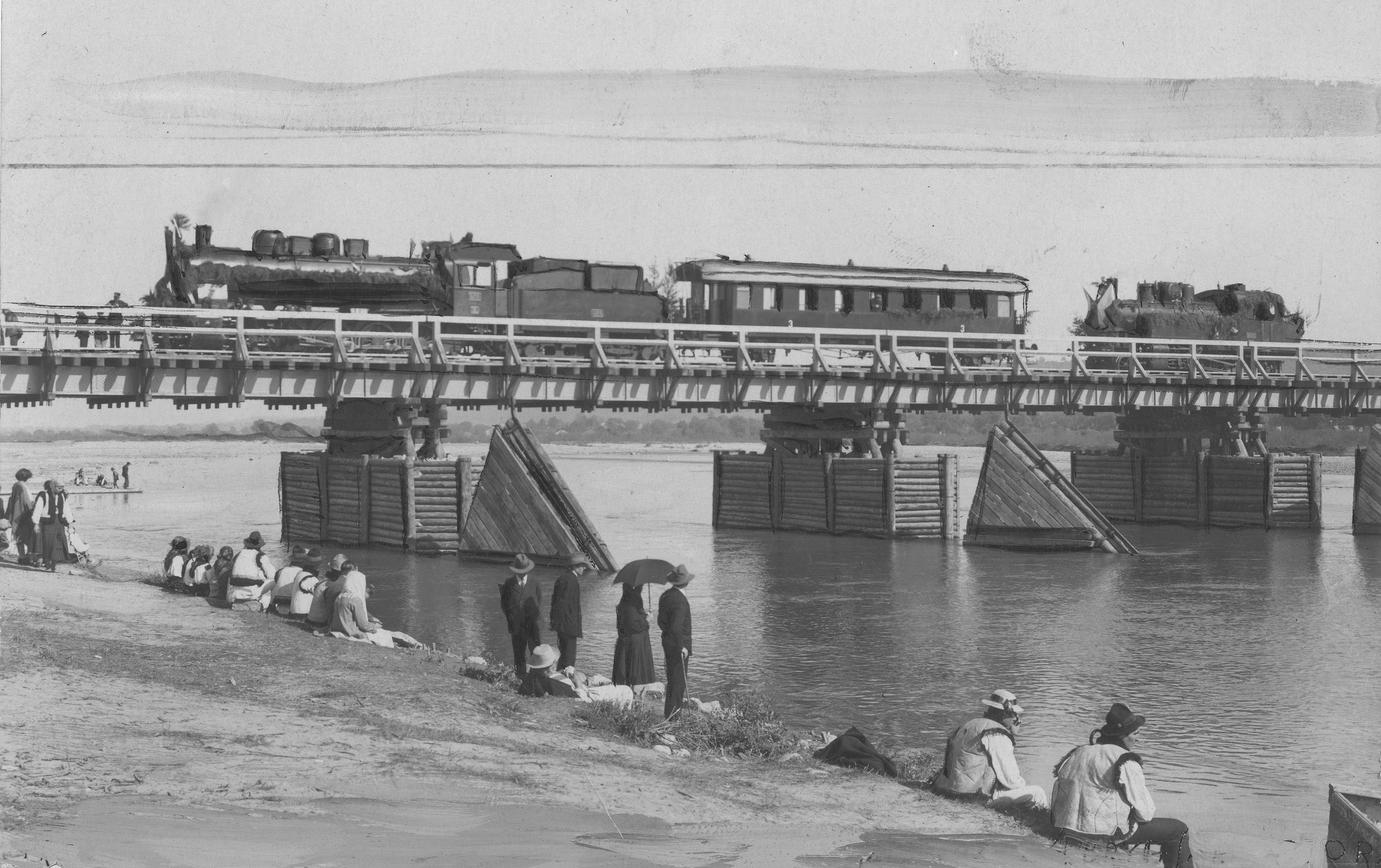 Otwarcie mostu w Kutach (lato 1930).